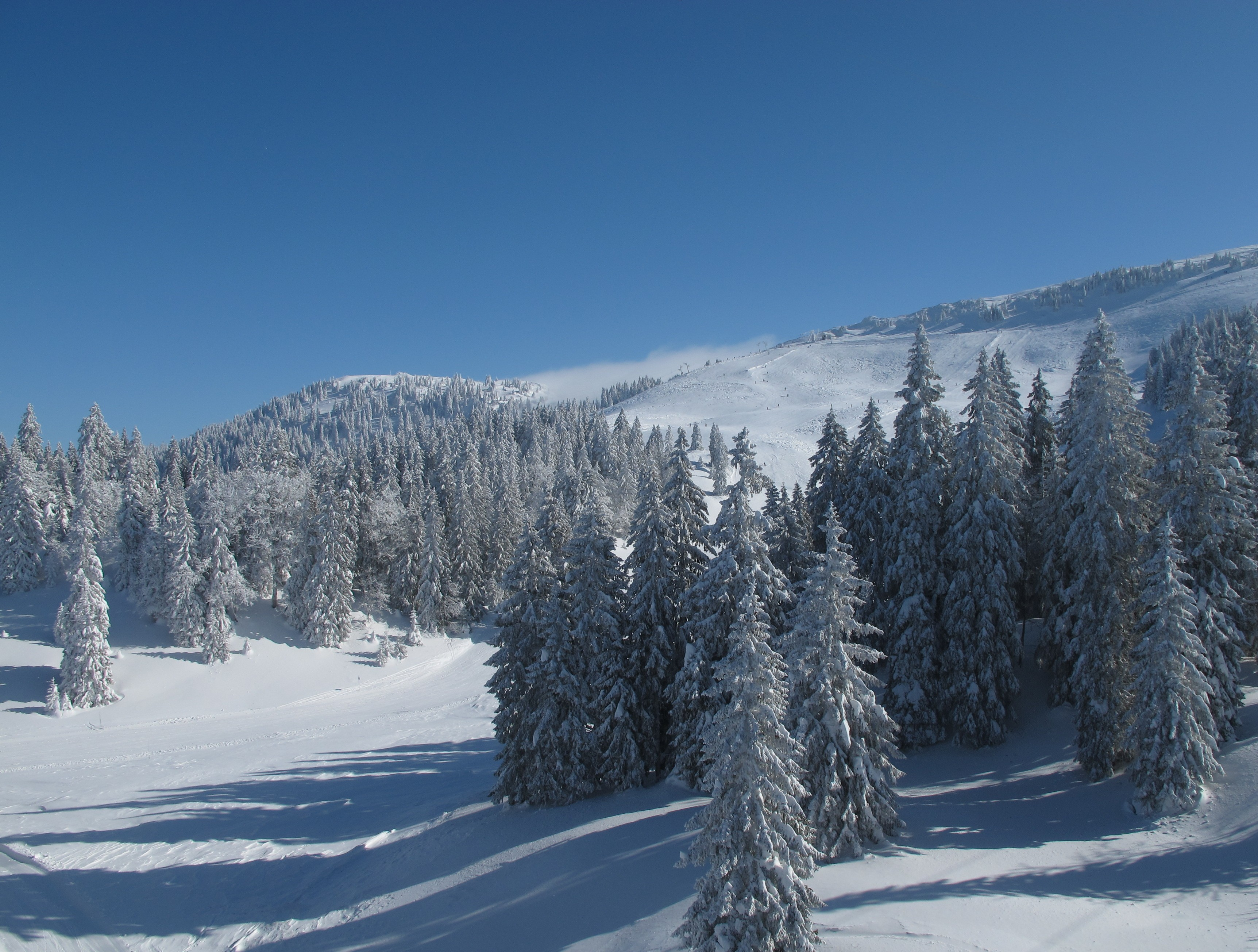 Parc Jura vaudois, la Dôle versant nord.